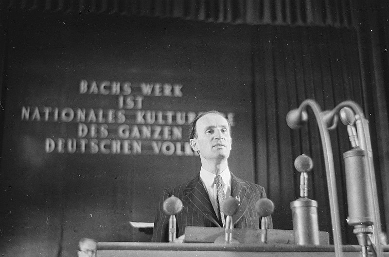 Original image description from the Deutsche FotothekPortrait Ernst Meyers am Rednerpult bei der Bachfeier